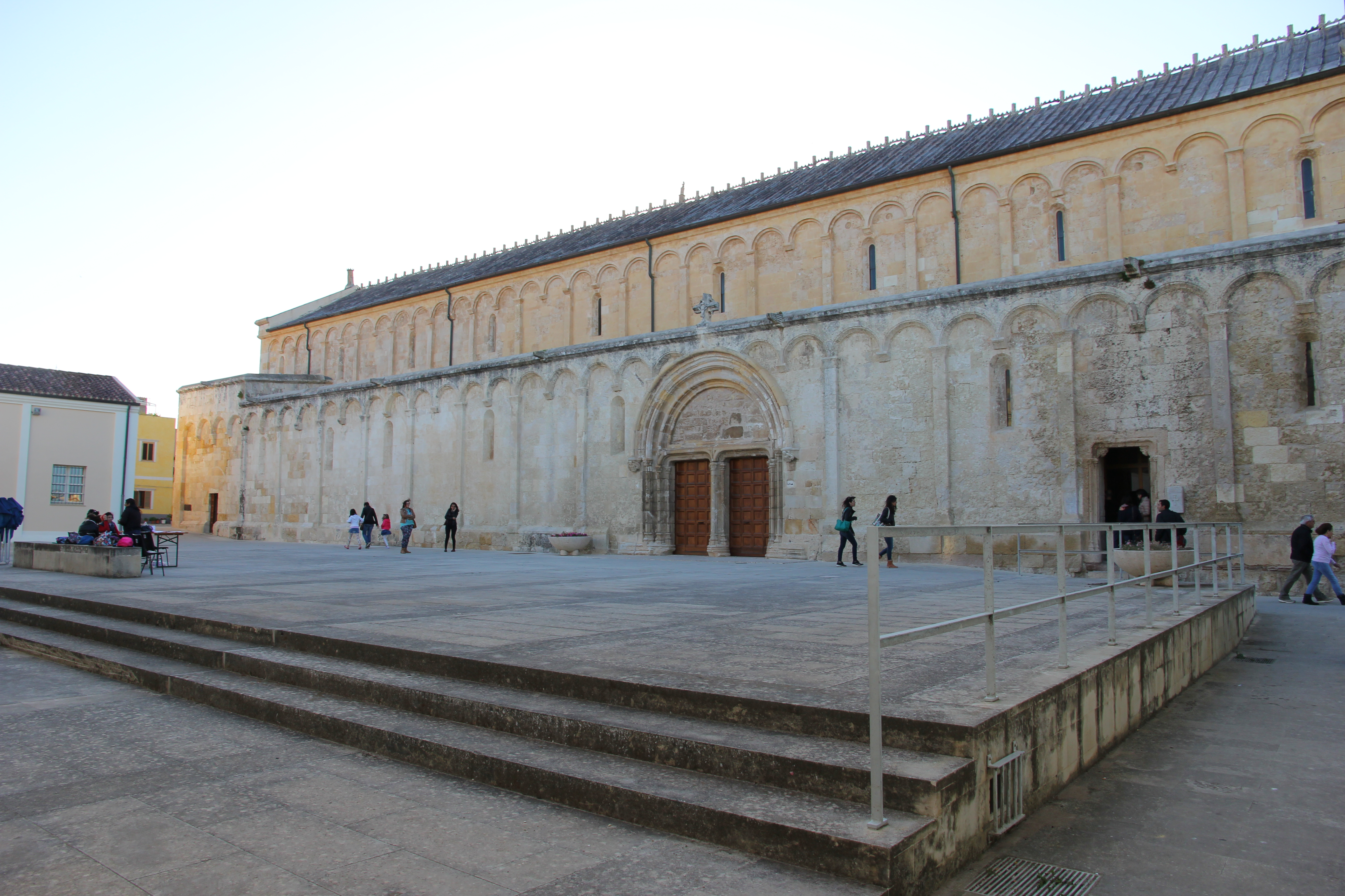 Porto Torres - Basilica romanica di San Gavino